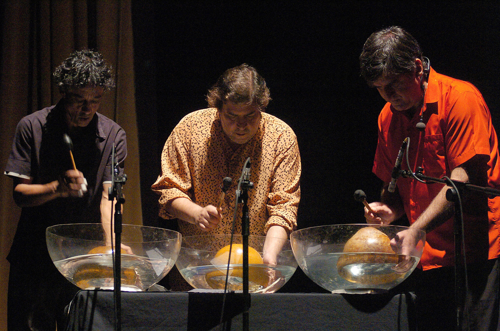 Auditório Ibirapuera. São Paulo. Brasil. Foto: Gerardo Lazzari (Olhos da Terra Fotografia)